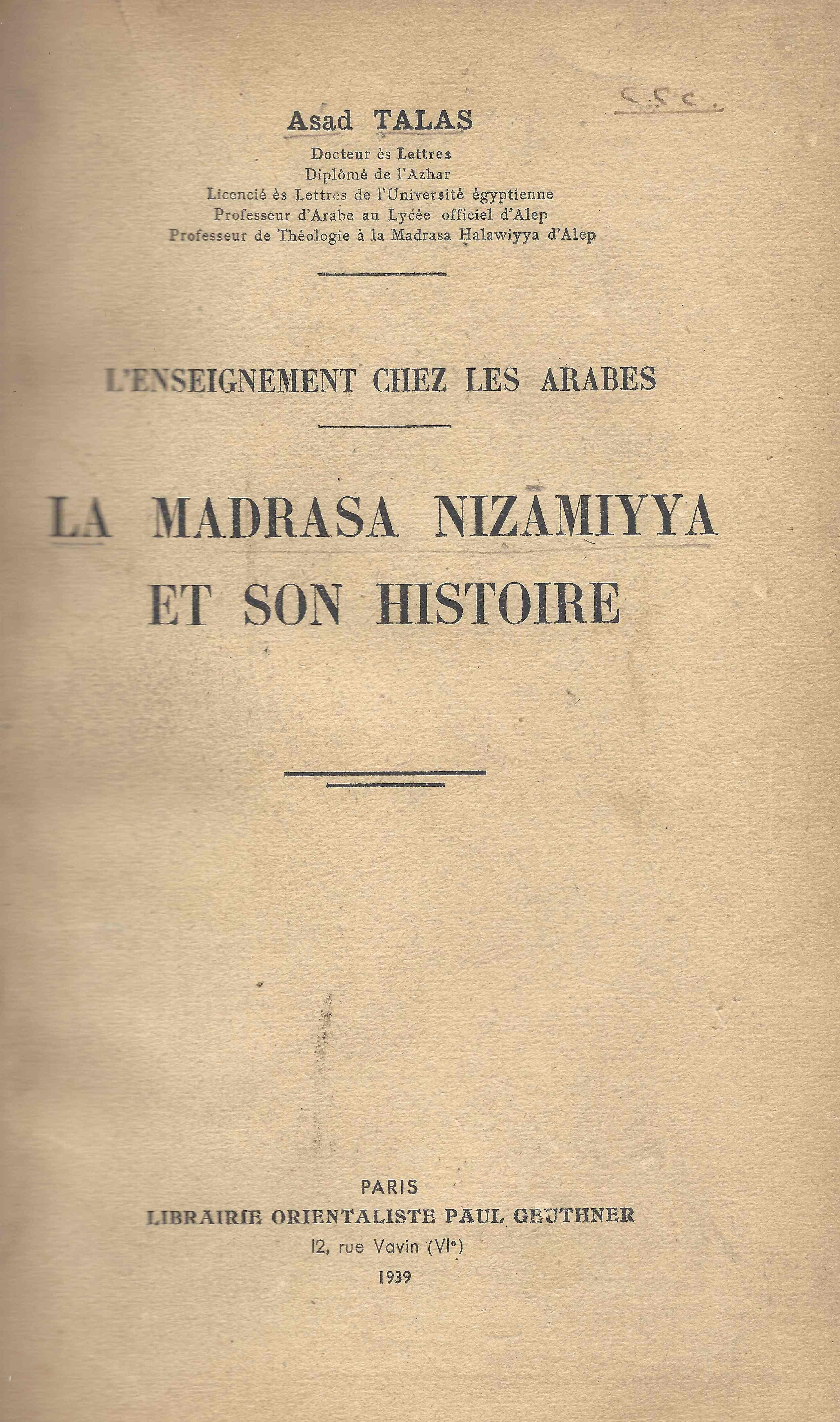 غلاف كتاب د. محمد أسعد طلس عن المدرسة النظامية باللغة الفرنسية - باريس - 1939